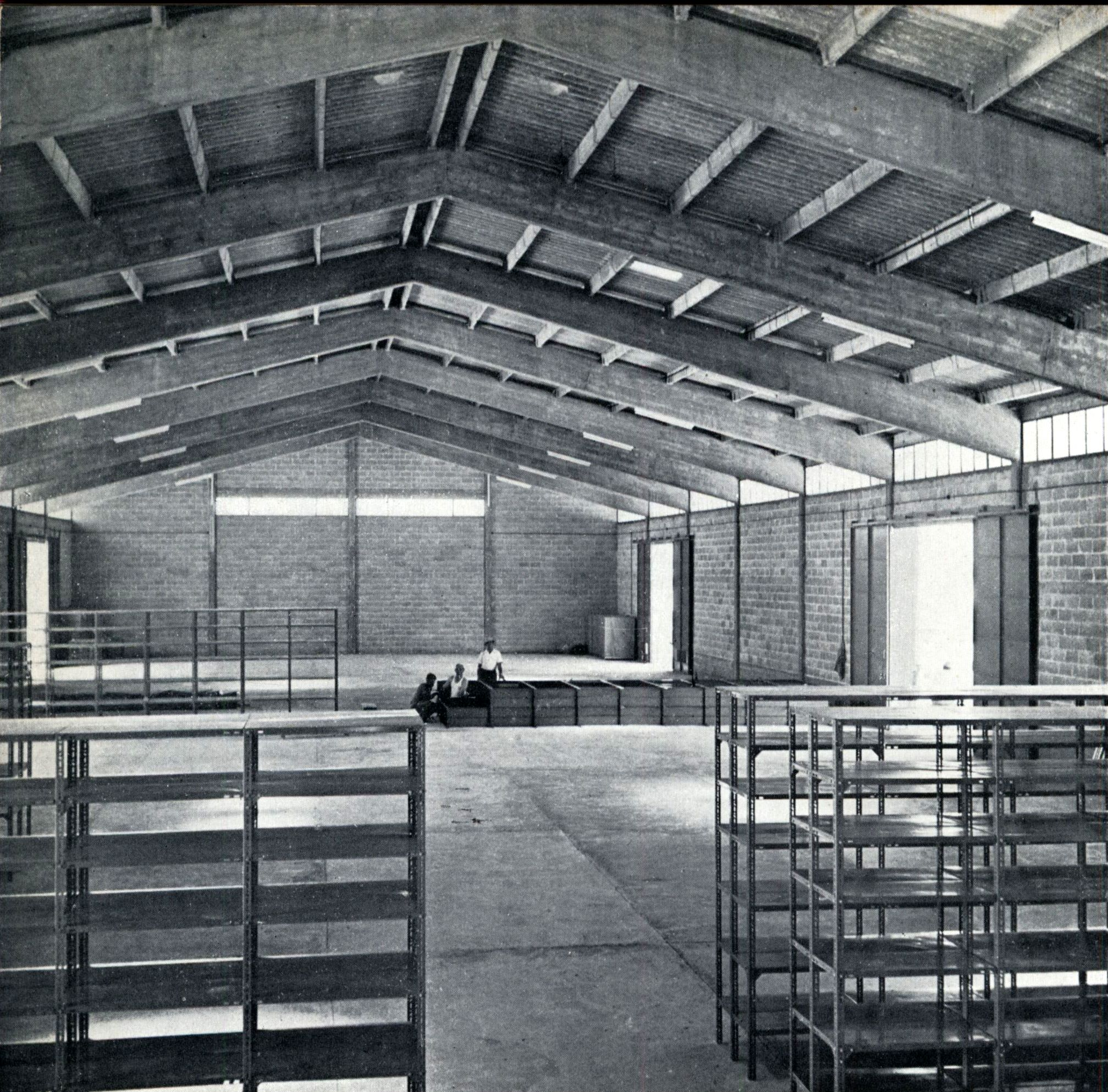 המחסן המרכזי של מ.ע.צ. בבת-ים, 1958